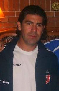 Marcelo Salas, futbolista chileno.